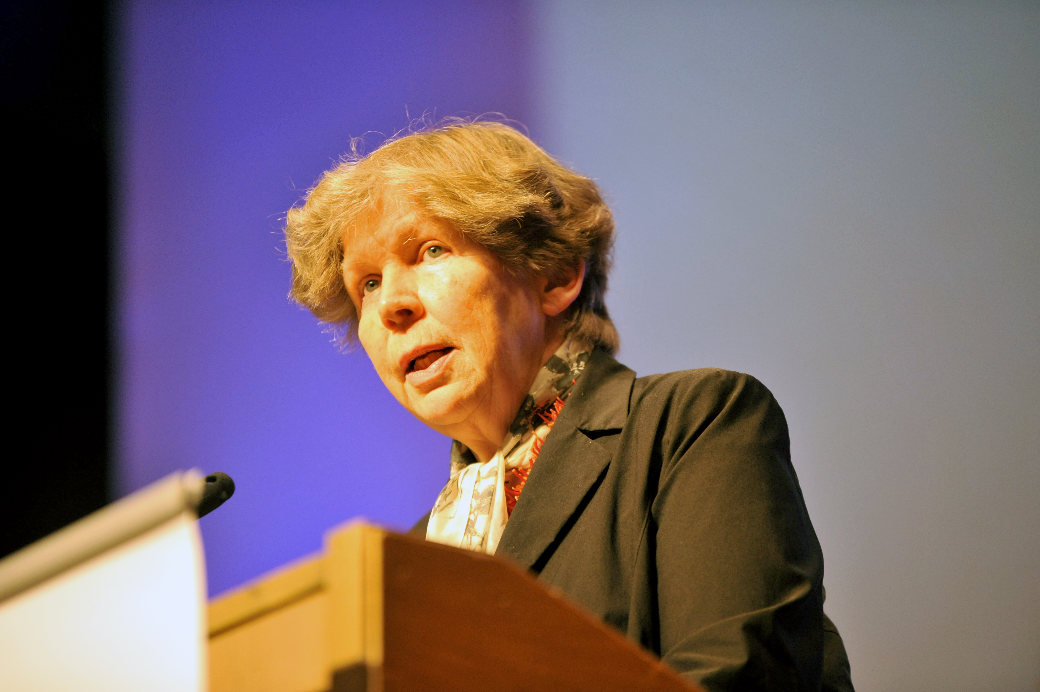 Hanna-Barbara Gerl-Falkovitz, Professorin für Religionsphilosophie an der TU Dresden, beim Vortrag zum Thema "Leib – Leben – Liebe" auf dem 7. Internationalen APS-Kongress in Würzburg.